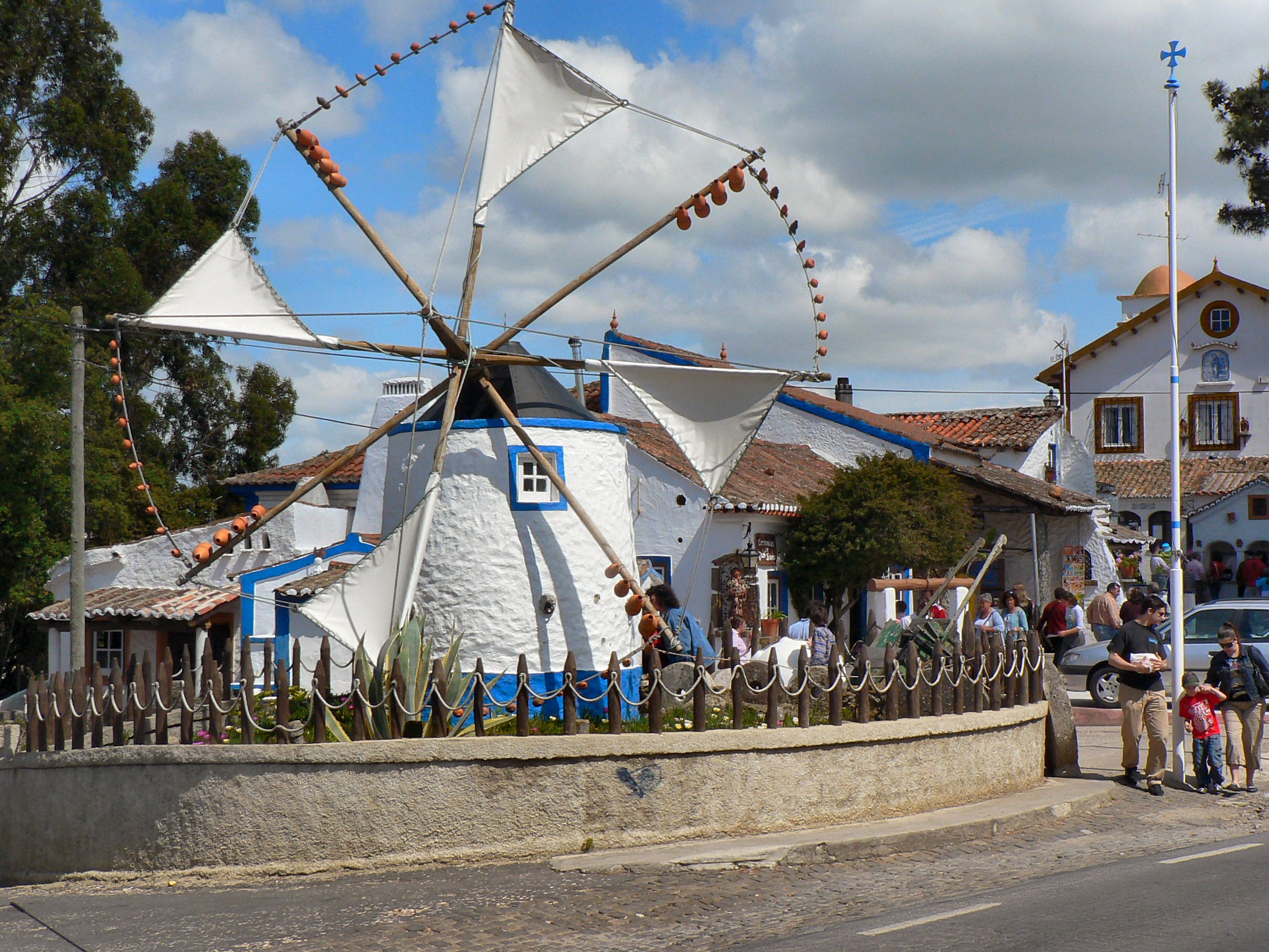 Aldeia típica de José Franco no Sobreiro, Mafra Autor: Paulo Juntas